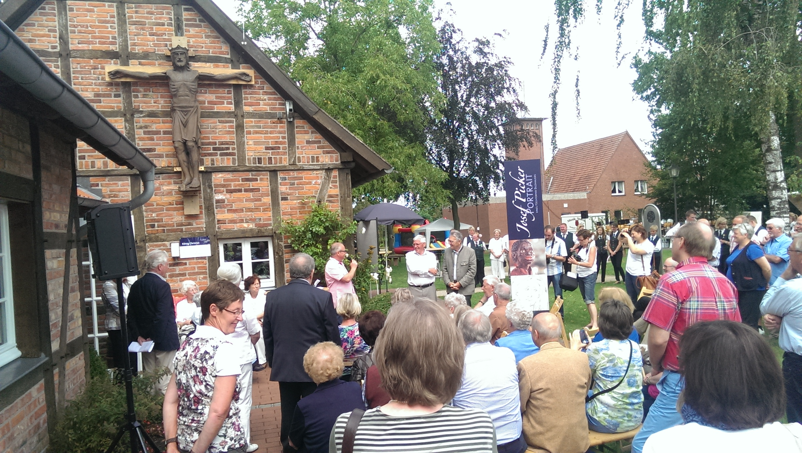 Eröffnung der Ausstellung zu Leben, Werken und Schaffen des Künstlers Josef Picker am 10. August 2014 anlässlich des 'Brunnenfestes' in Füchtorf. Am Giebel des Heimathauses (oben links im Bild) befindet sich die Figur des "König Christus", die Josef Picker um 1925 schuf und die bis zu einem Sturmschaden in den 50er Jahren auf dem Füchtorfer Friedhof stand.